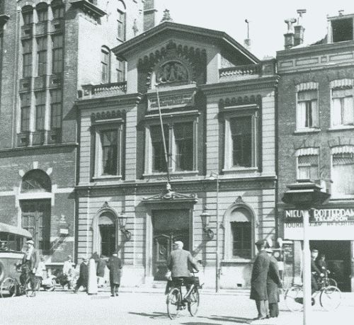 De Academie voor Beeldende Kunsten en Technische Wetenschappen van Rotterdam, begin 20e eeuw